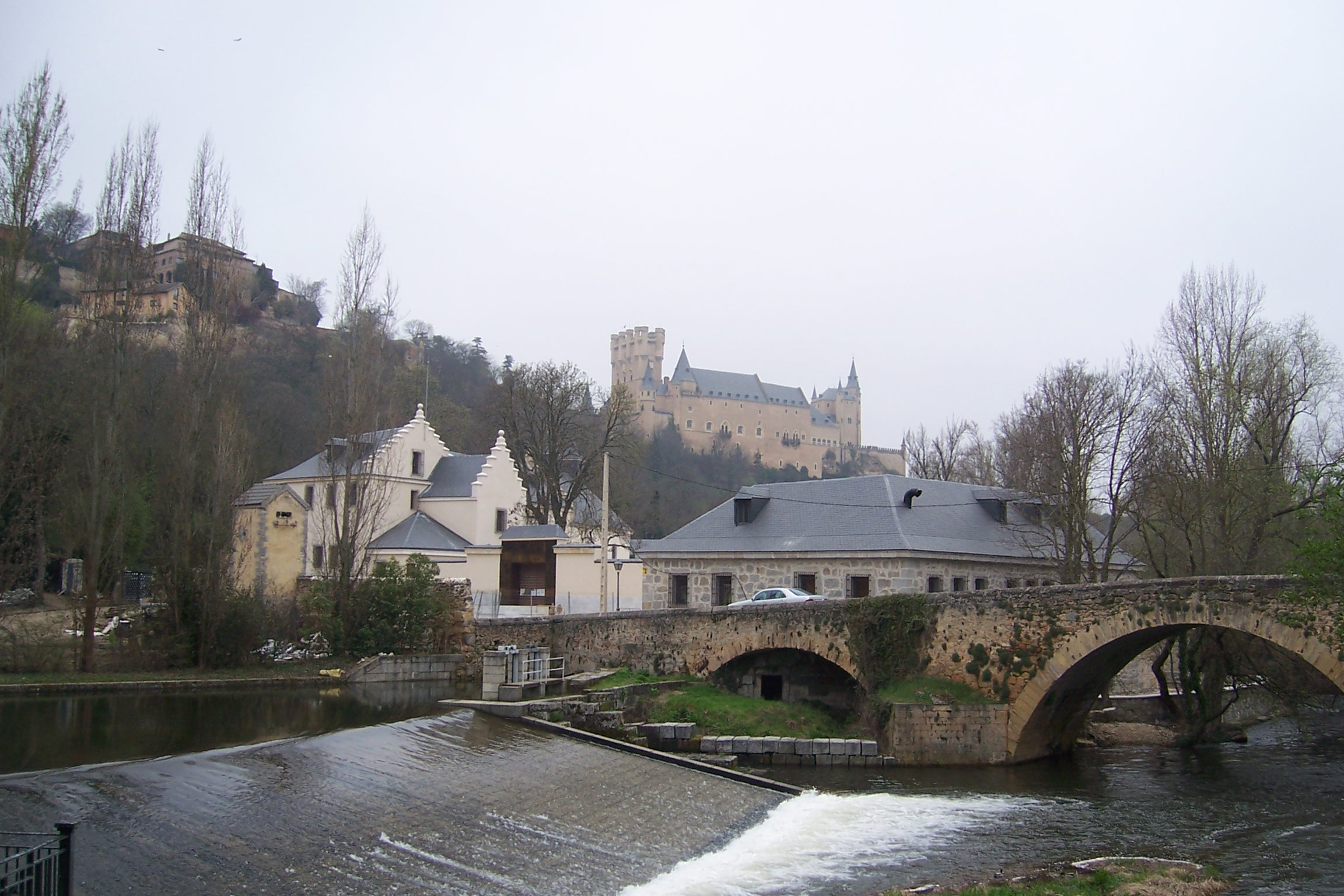 Aceña y presa en el río Eresma, pertenecientes a la antigua fábrica de moneda de la ciudad española de Segovia.